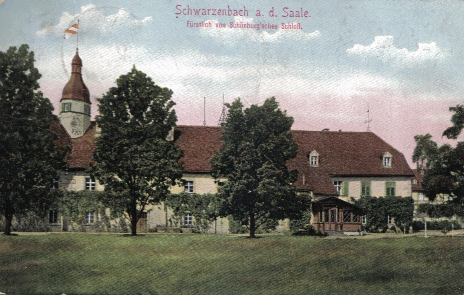 Schlos in Schwarzenbach, bayerische Briefmarke, Stempel nicht lesbar